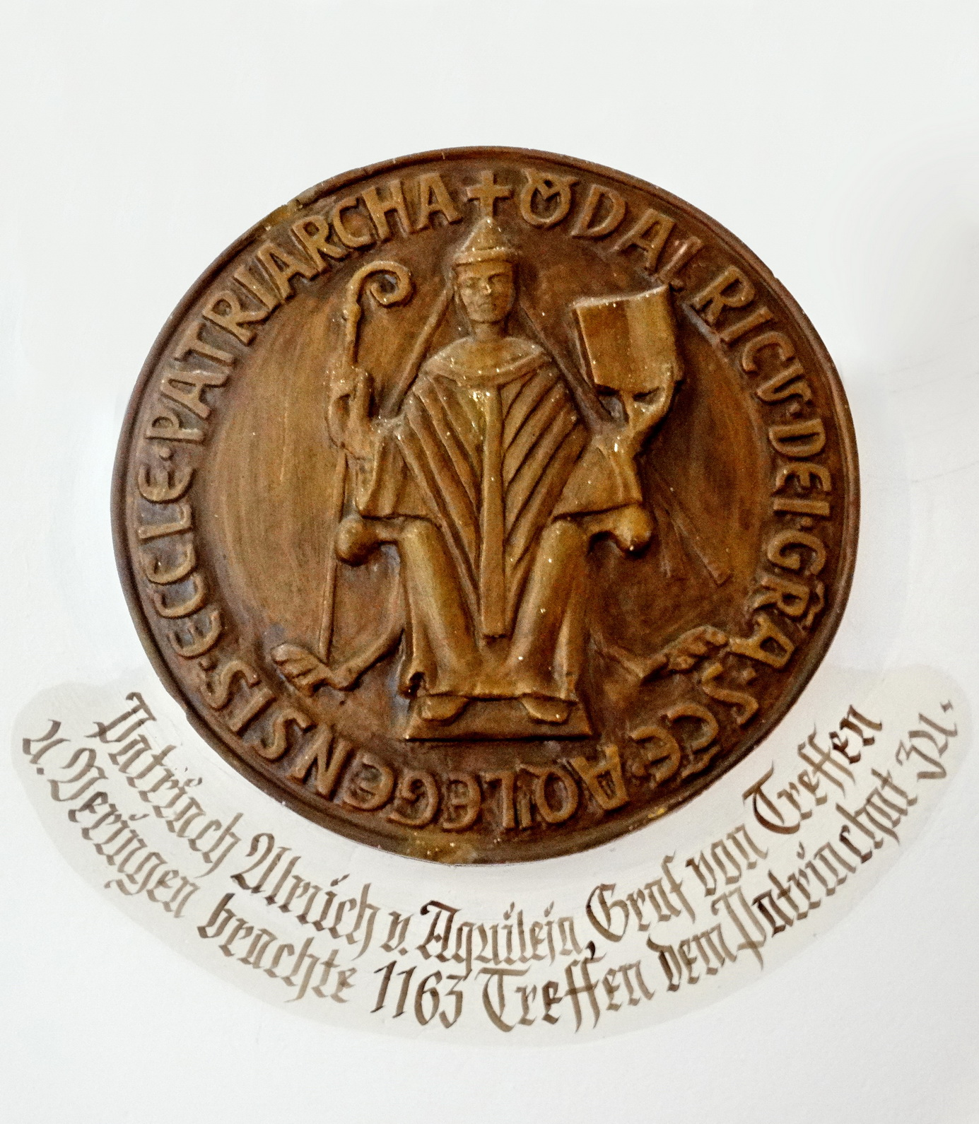 Siegel von Ulrich II. von Treffen († 1. April 1182). 1161 bis 1181 Patriarch von Aquileia in Norditalien. Zunächst unterstützte er Kaiser Friedrich I. (Barbarossa) in seinem Kampf um die Vorherrschaft über die nördlichen italienischen Staaten und das Papsttum. Beim Friedensschluss 1177 zwischen Kaiser Friedrich I. und Papst Alexander III. war er vermittelnd tätig. Ulrich starb am 1. April 1182. Siegel-Inschrift: + (V)ODALRICU DEI GRA SCE AQILEGENSIS ECCLE PATRIARCHA Die Nachbildung des Siegels befindet sich im Rathaus von Treffen (Kärnten)